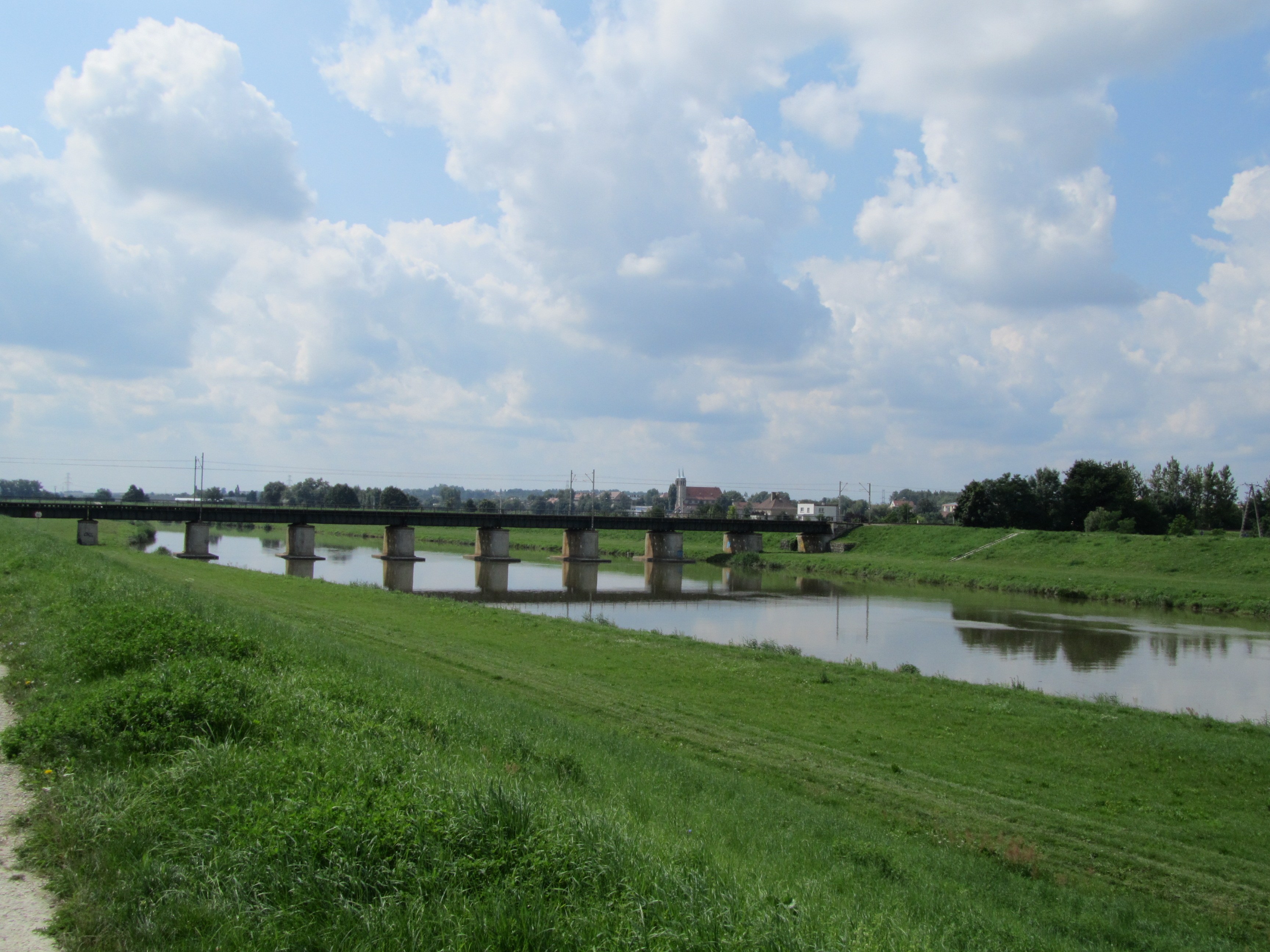 Plavební kanál v Opoli, Polsko